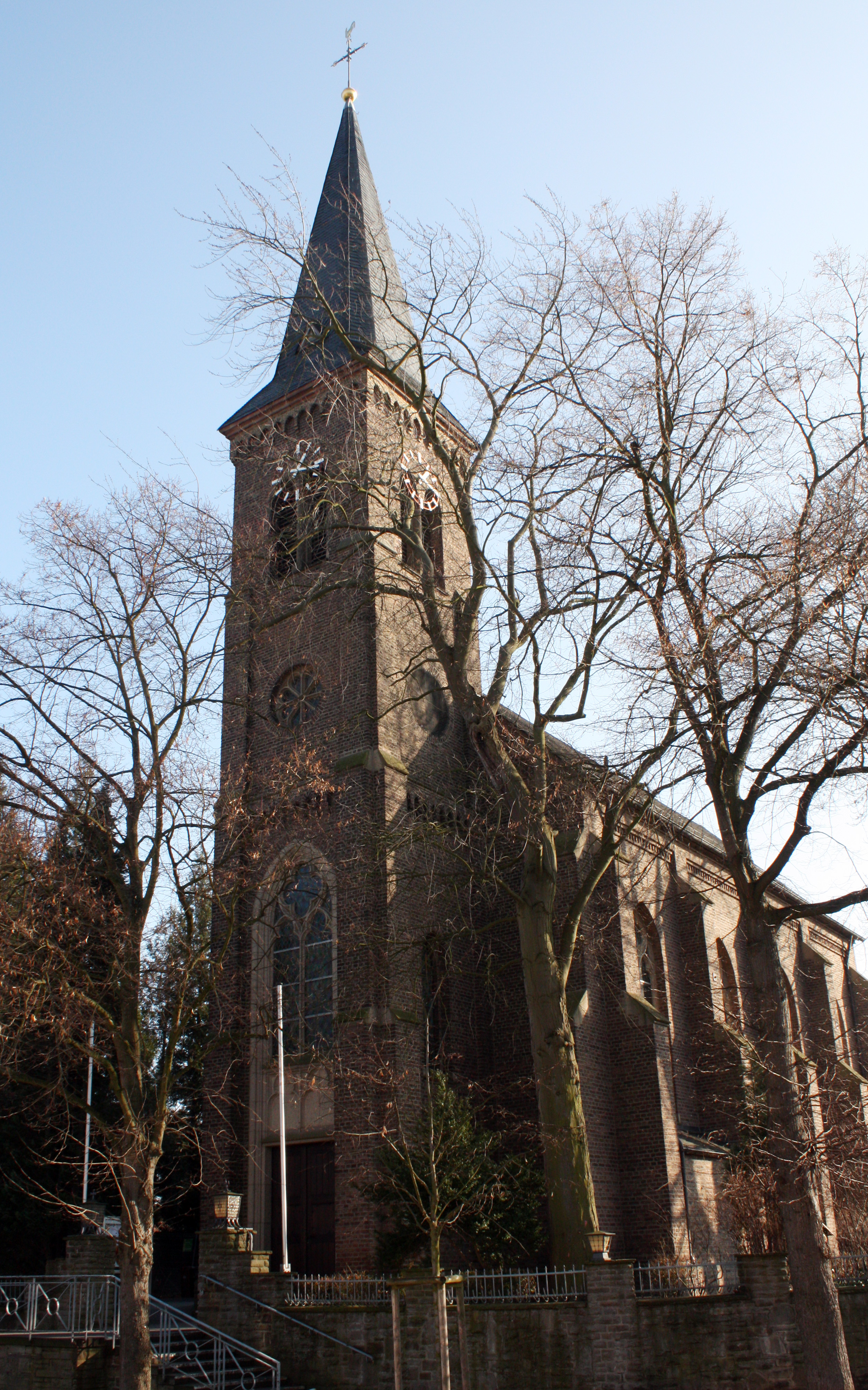 Brühl Schwadorf, St. Severin Nordwestseite